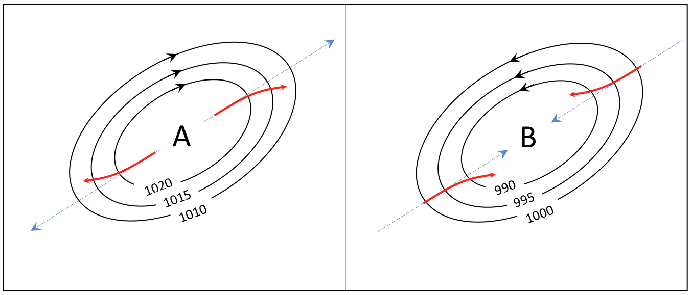 Ipar hemisferioko antizikloien eta borrasken eskema.